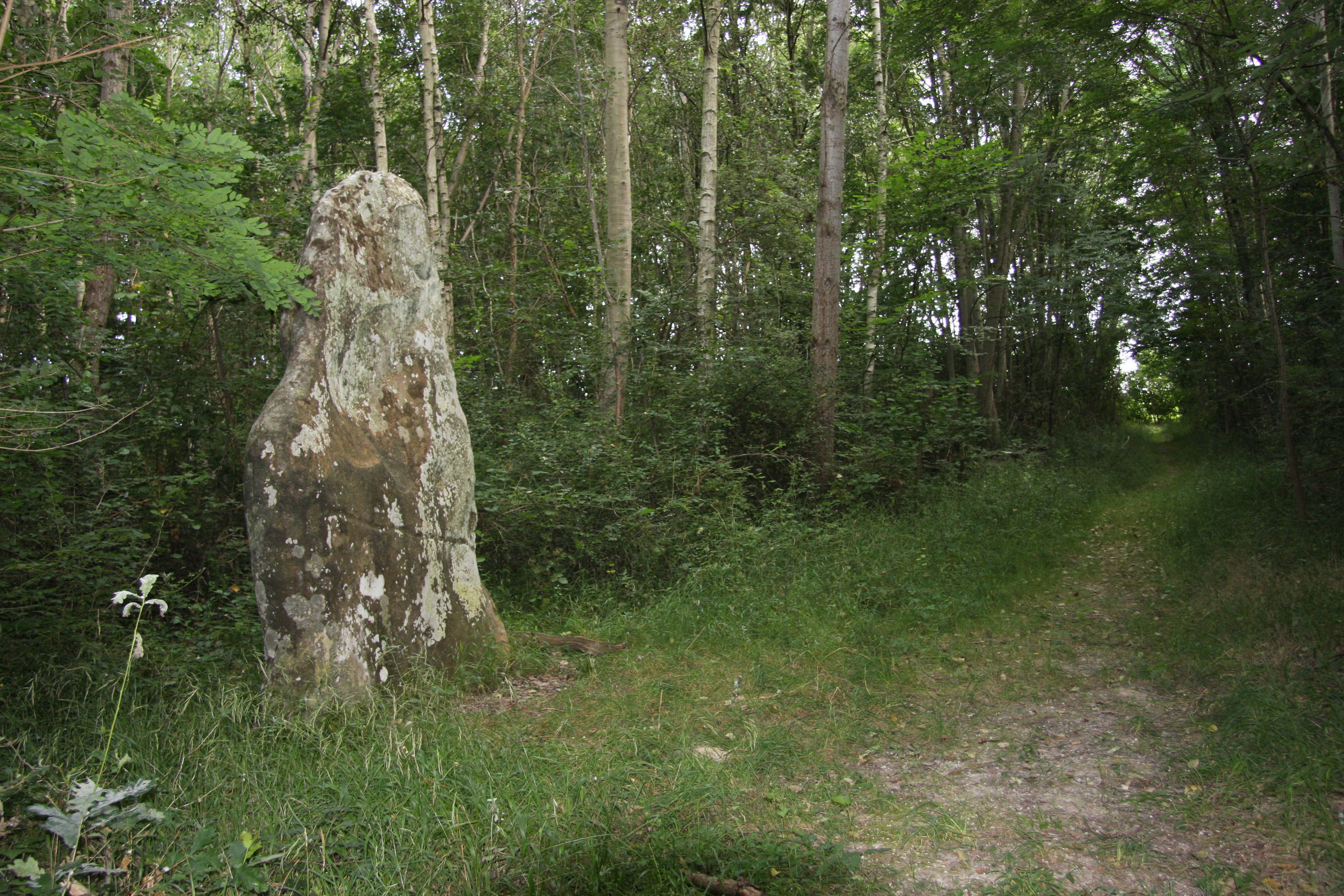 La Pierre-Fitte, menhir de 3 m de haut sur la commune de Beautheil